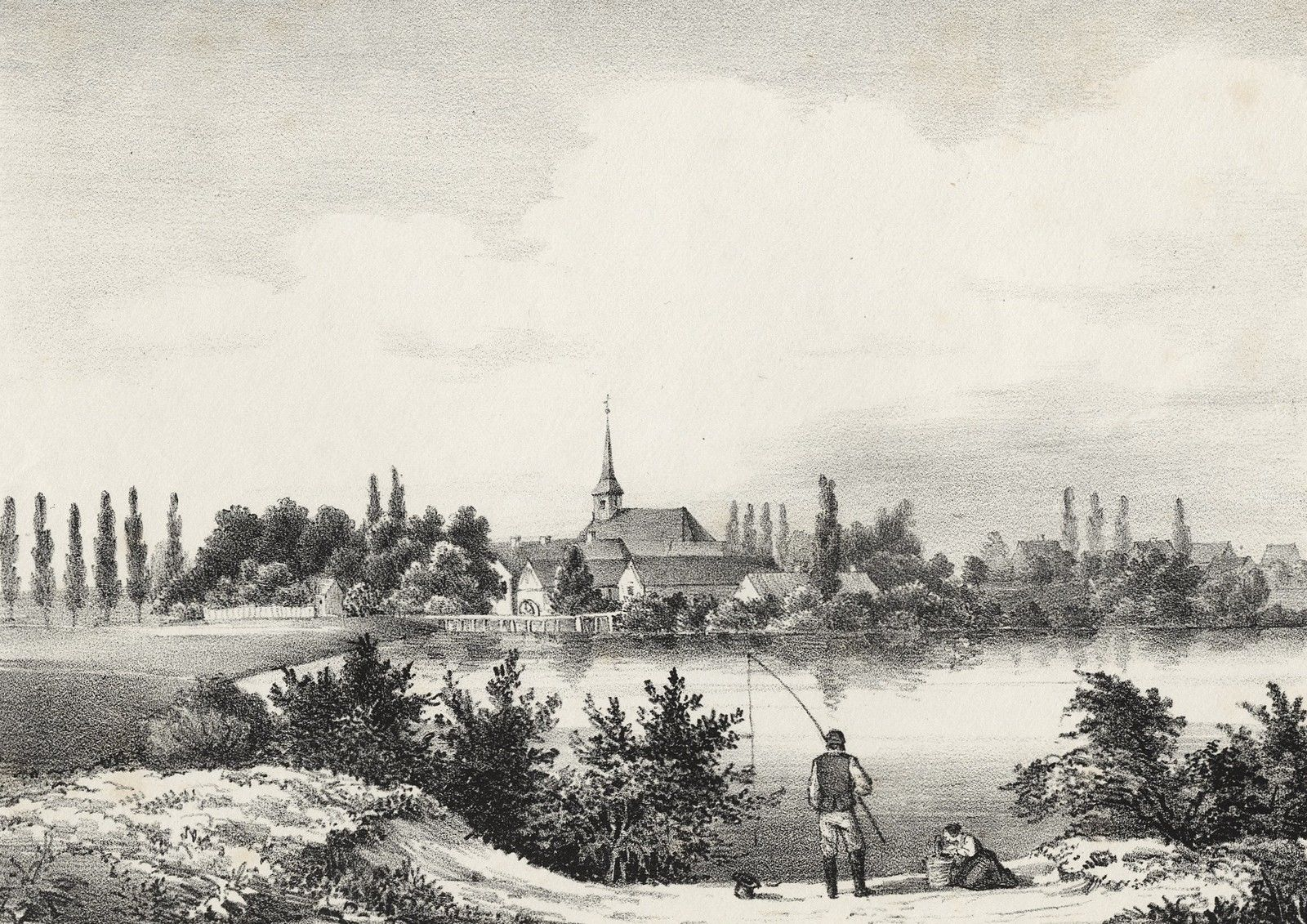 Marienfliess, Historische Stadtansicht. Lithographie, 1846. 13,7 x 19,3 cm (Darstellung ) / 20,6 x 26,1 cm (Blatt), Unterhalb der Darstellung mittig betitelt, sowie mit dem Vermerk "Lith. Anst. v. E. Sanne u. Co. in Stettin" unten rechts versehen.